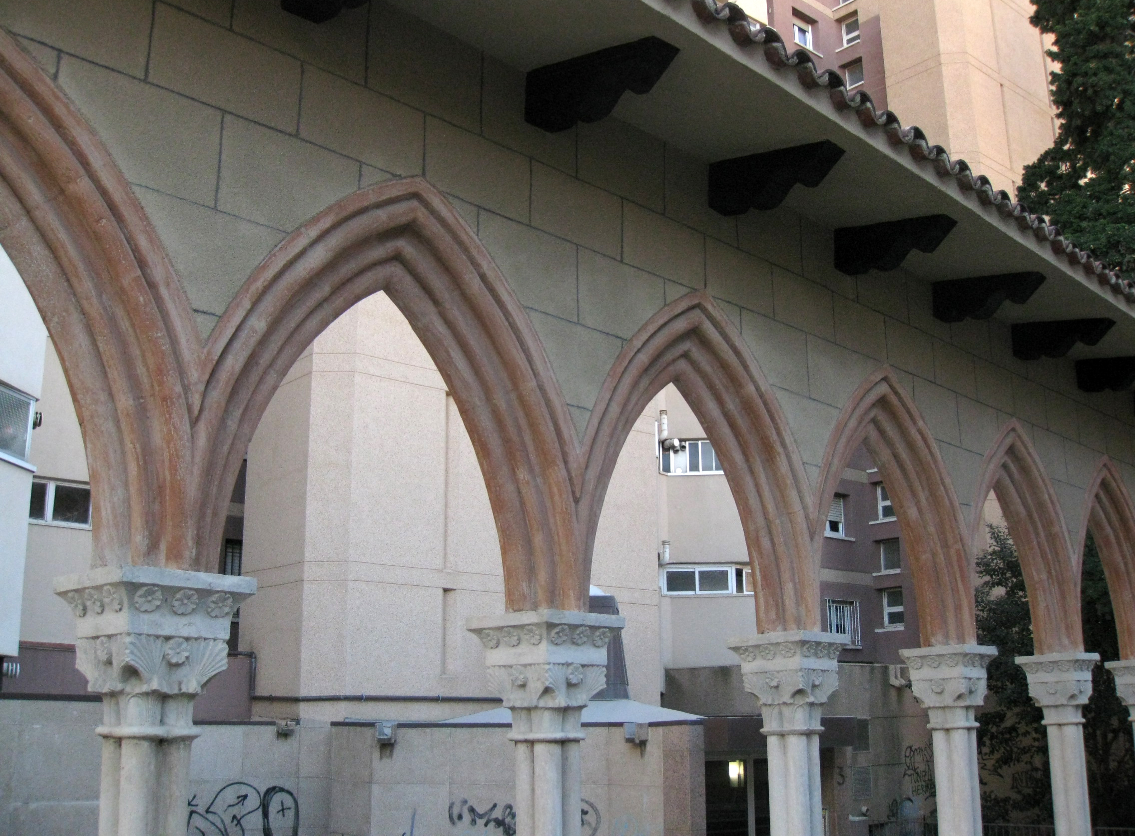 Fragment del claustre de Sant Pere de les Puel·les de Barcelona, al carrer de Sant Ignasi núm. 1 (Terrassa). Arcada gòtica del segle XIII.